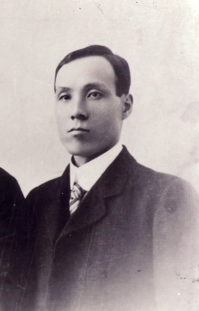 Japanese poet/writer Tekkan Yosano (与謝野鉄幹, 1873–1935)